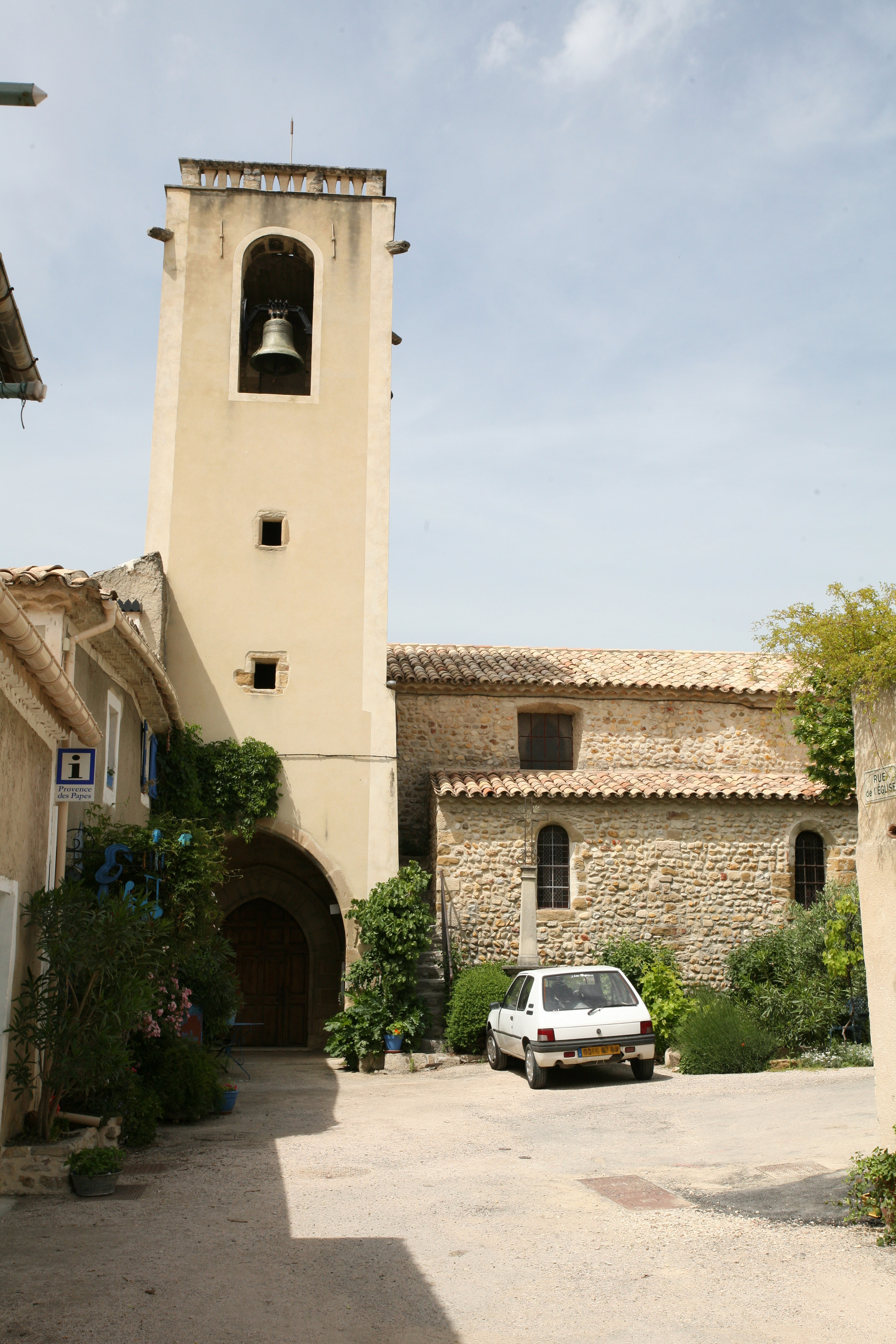 Buisson (Vaucluse)